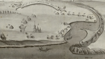 Фрагмент Перспекта Жиганского города с Изъяснением. XVIII—XIX века